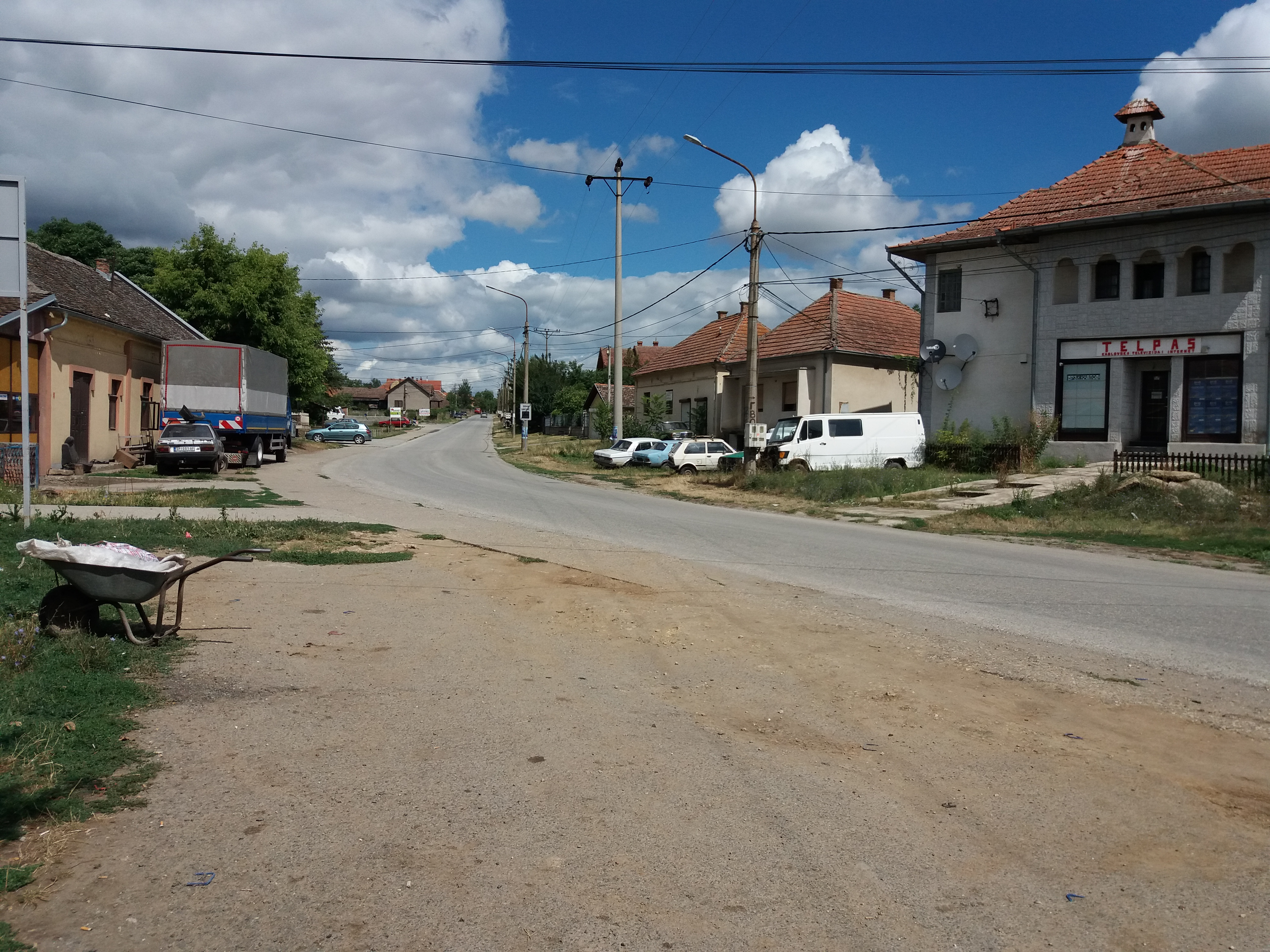 Srpski (latinica): Azanja